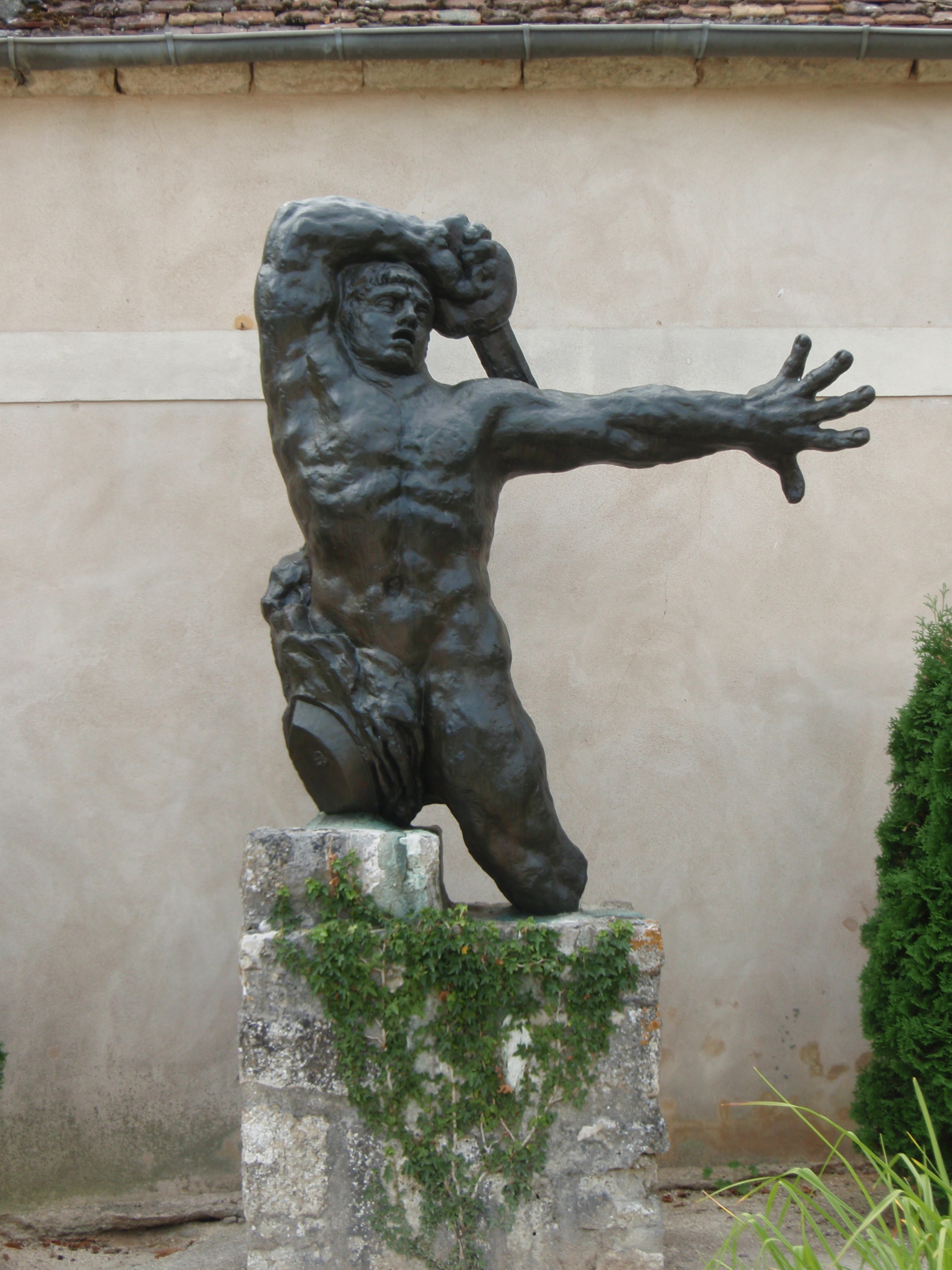 Grand guerrier dit de Montauban réalisé entre 1898 et 1900, bronze du Jardin musée Bourdelle à Egreville en Seine et Marne prés de Paris en France.